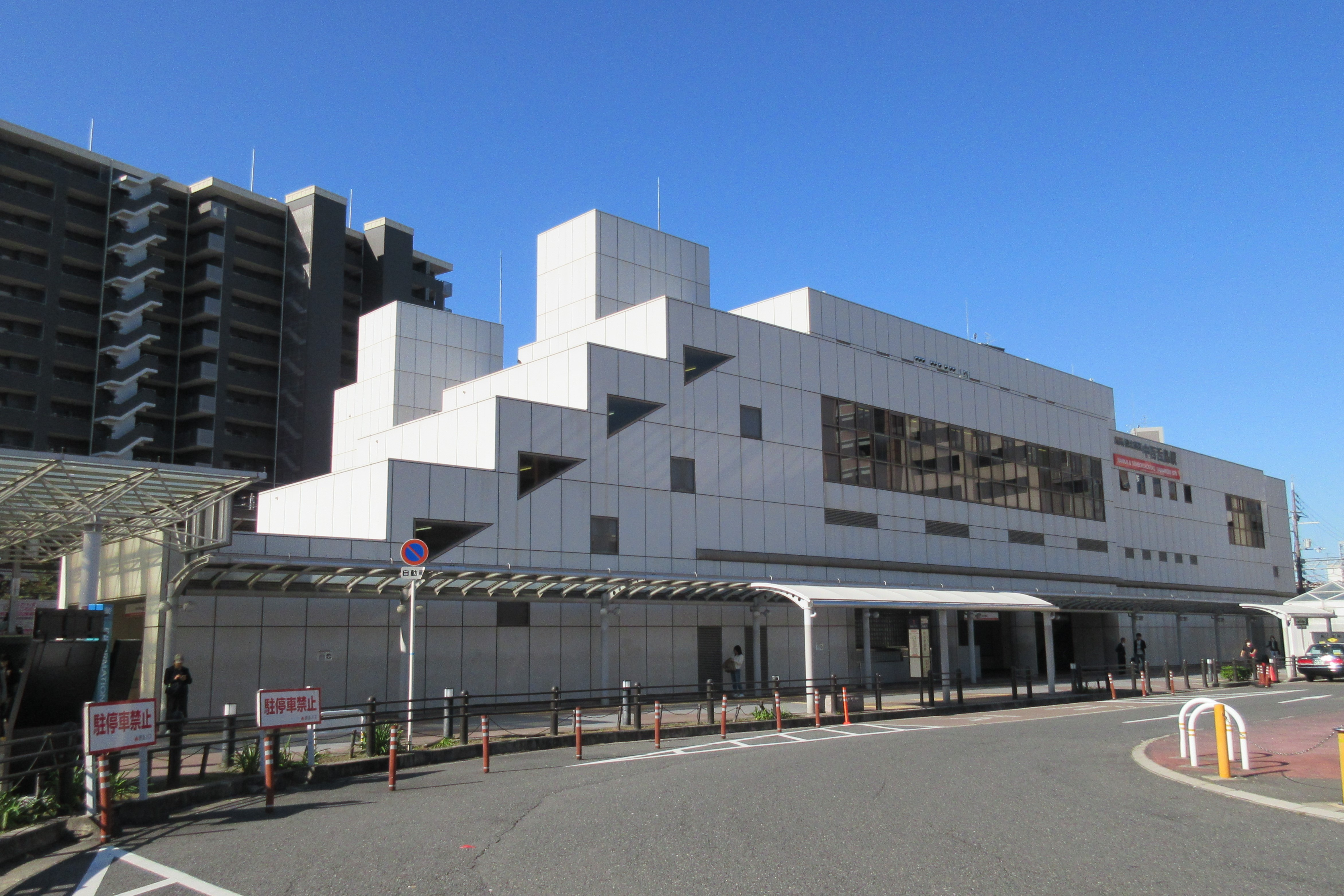 南海電鉄中百舌鳥駅